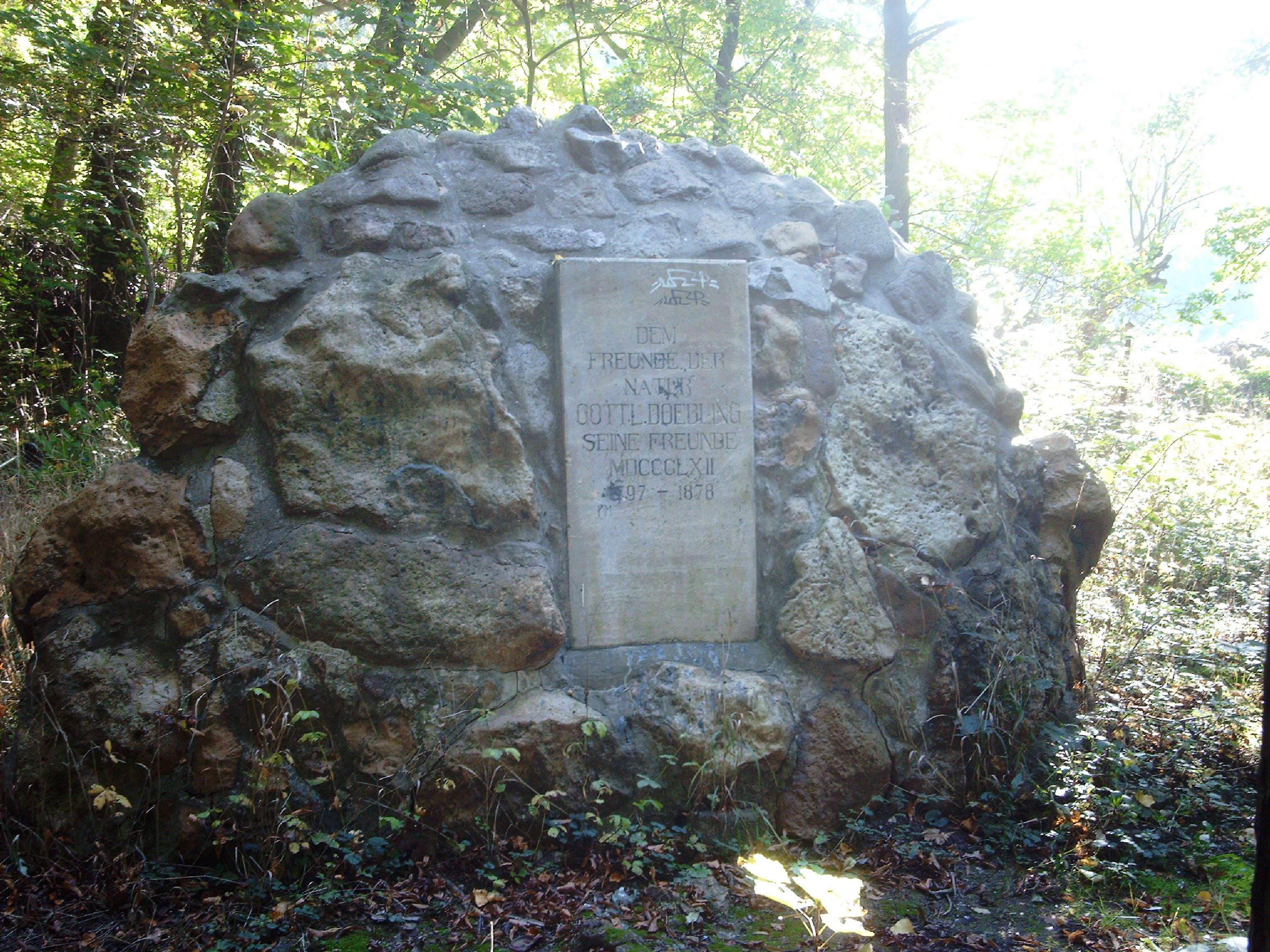 Gedenkstein für Gottlieb Döbling in Arnstadt